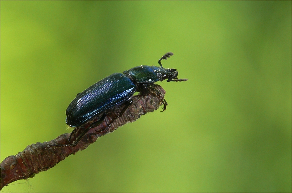 Kleiner Rehschröter (Platycerus caraboides)